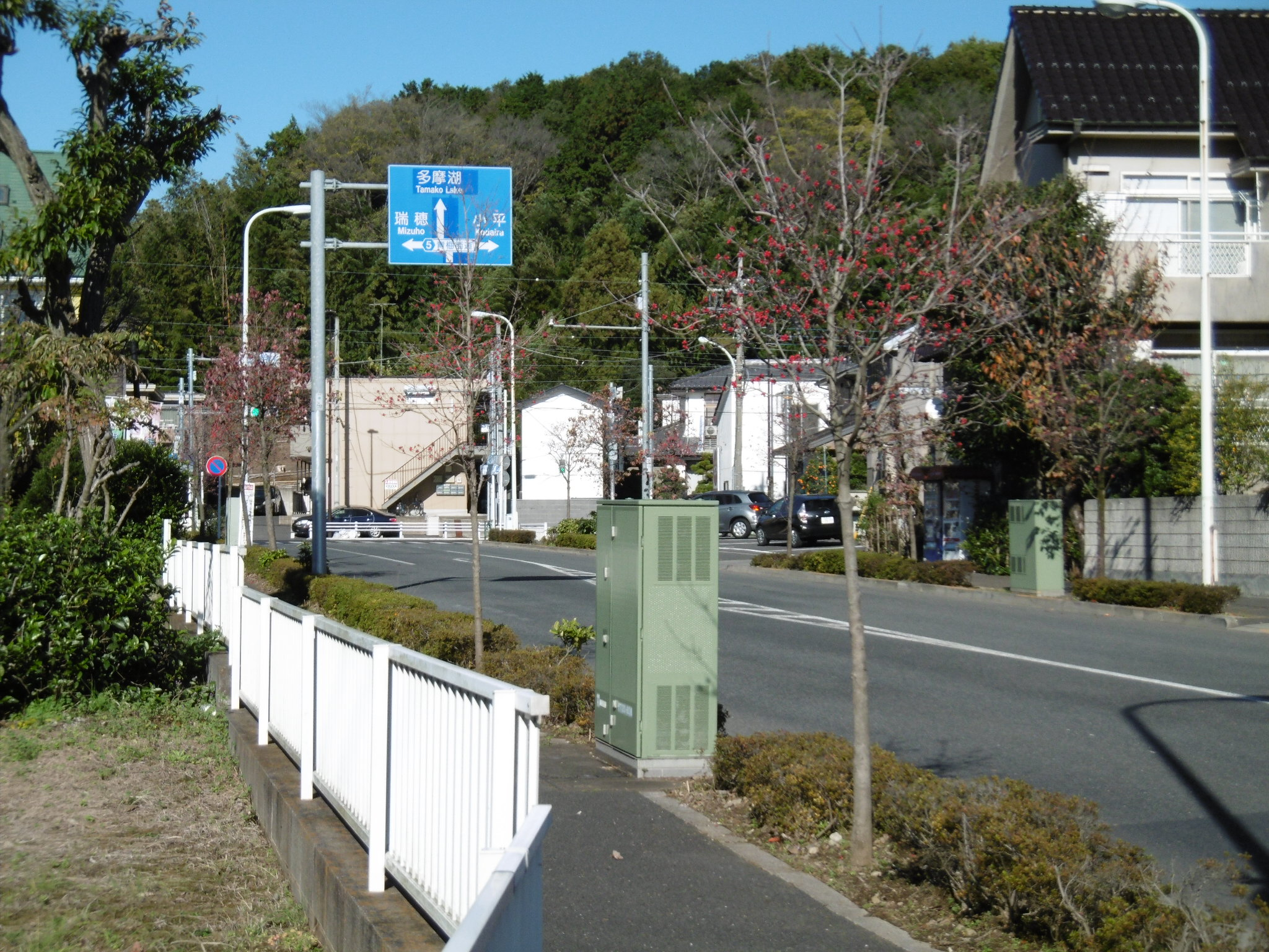 東京都東大和市内を通る東京都道43号立川東大和線の終点(蔵敷公民館北交差点)付近。その終点付近で東京都道5号新宿青梅線（青梅街道）に接続する。